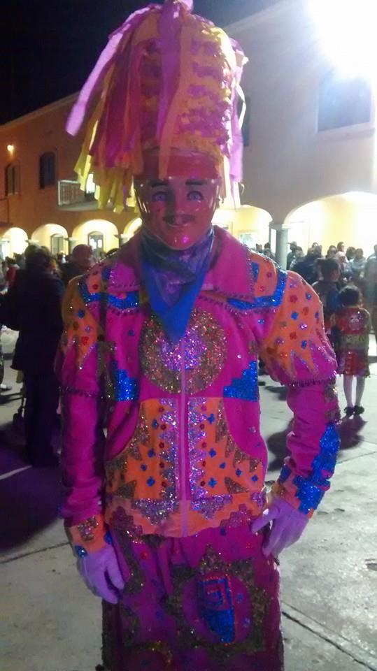 El Carnaval de Buenavista es unico en su tipo. No debe confundirse con El Carnaval de Tlaxcala.